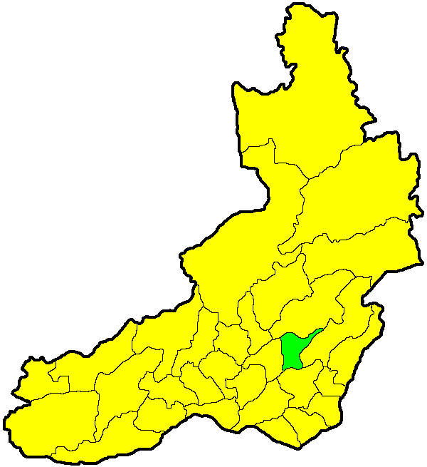 Шелопугинский район на карте Забайкальского края